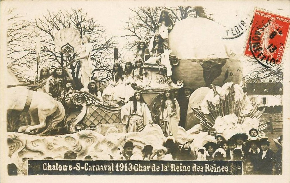 Le Char de la Reine des Reines de Paris 1912 réutilisé au Carnaval de Chalon-sur-Saône pour la Reine des Reines du Carnaval de Chalon-sur-Saône 1913.